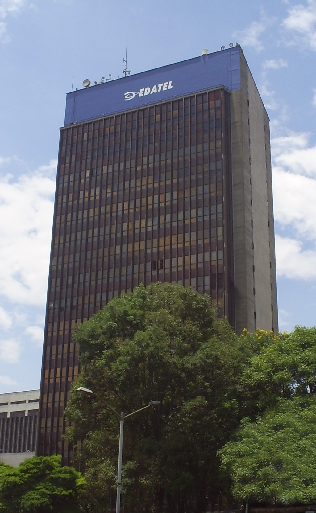 edificio sede de la empresa EDATEL, Medellín, Colombia.